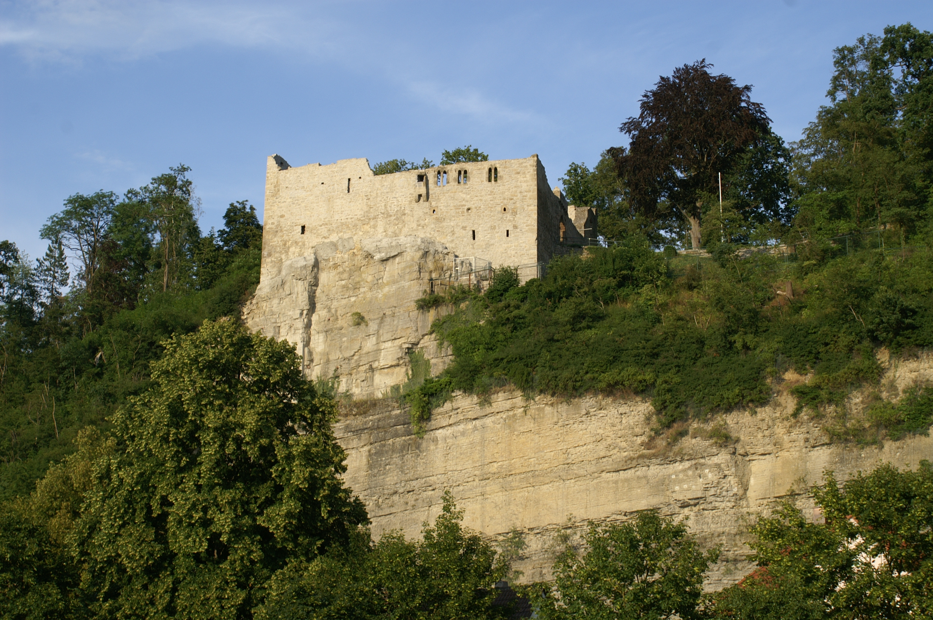 Die Burgruine Löffelstelz steht über Dürrmenz, einem Stadtteil von Mühlacker im Enzkreis